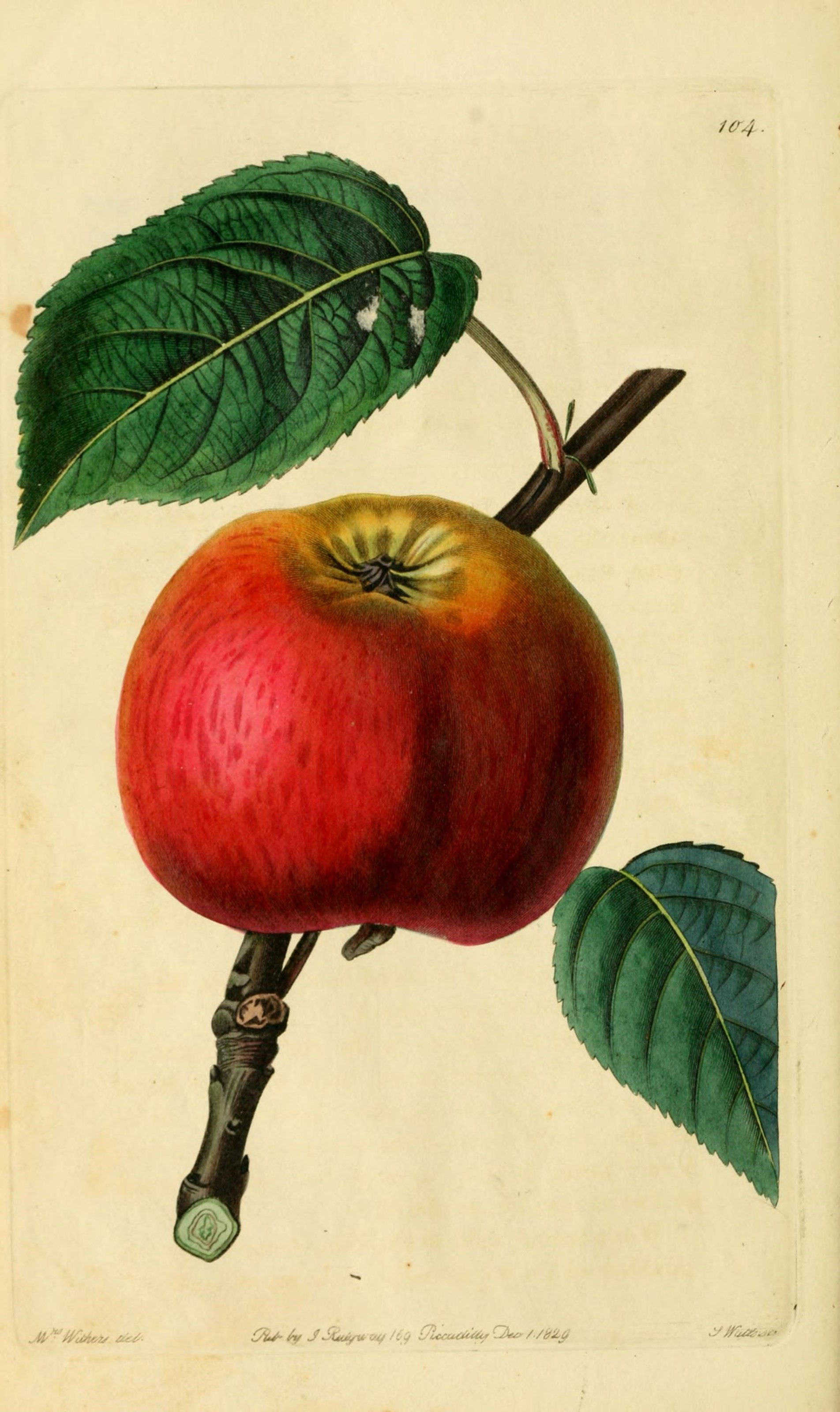 ta4 M'^'H^HU^i^ &.^ C^ ^ jS(,i^ cy /f 1^ C/Lceudia.f Qs^ / /dz^ '^^ua-^.